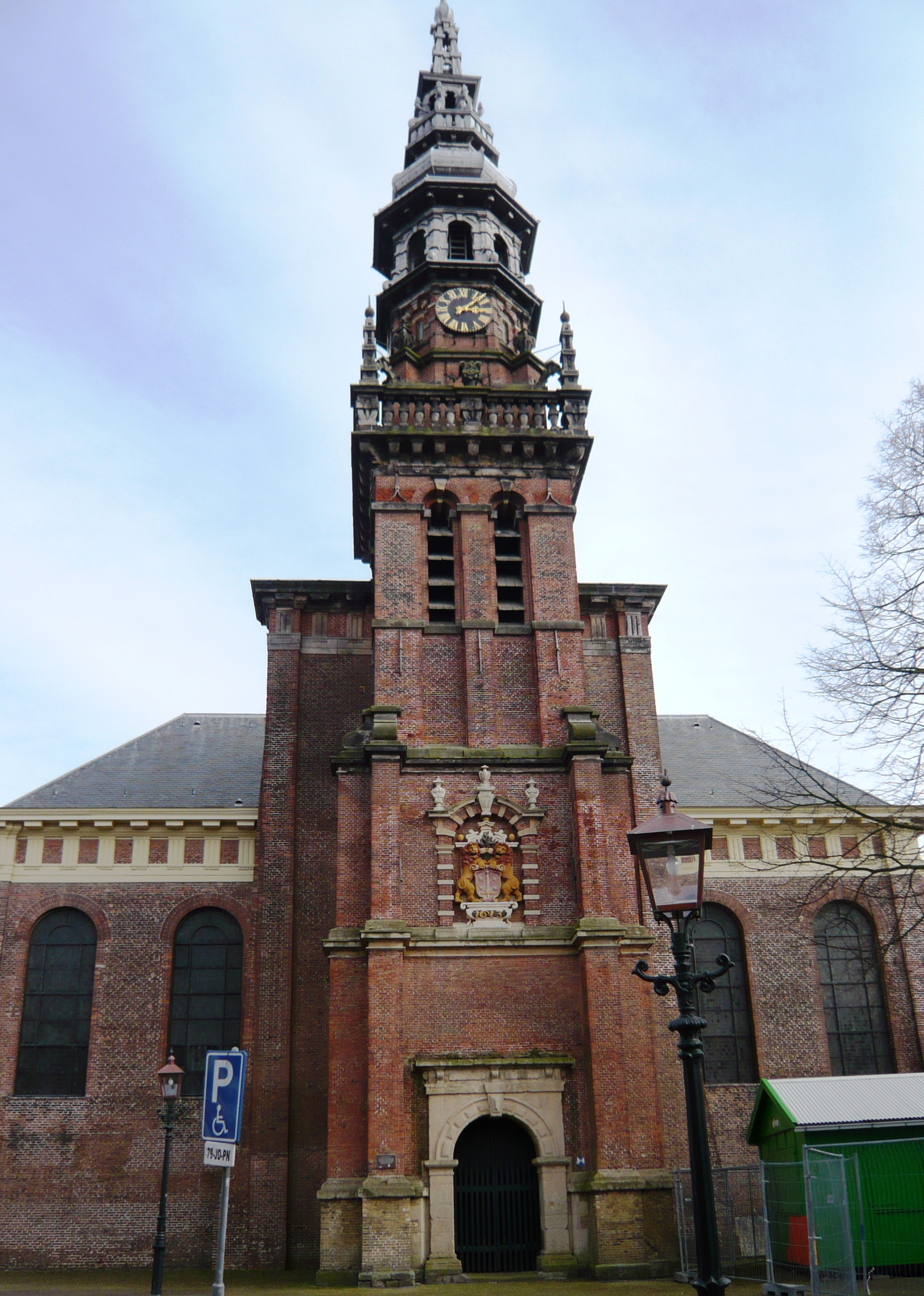 Nieuwe Kerk in Haarlem. Gezien vanuit het westen, Nieuwe Kerksplein, Haarlem.